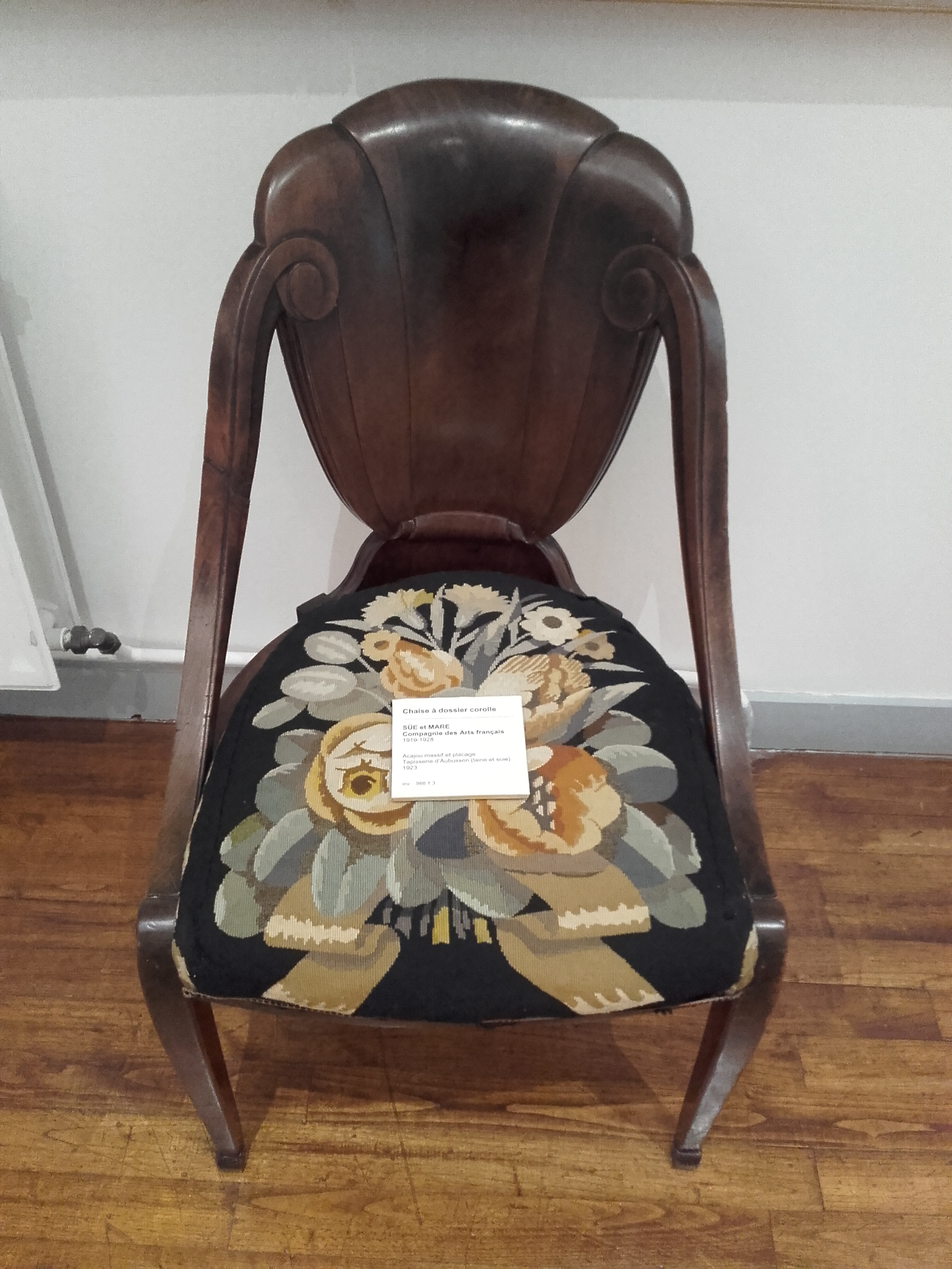 Süe et André Mare Musée des Beaux-Arts de Bernay acajou massif et placage, tapisserie d'Aubusson, 1923